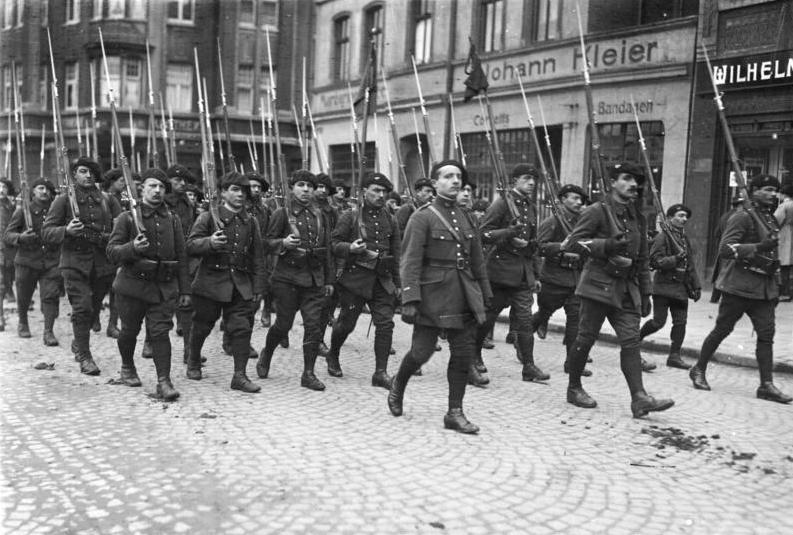 Zur Befreiung des besetzten Gebietes am 30. Juni 1930! Ein interessanter Rückblick aus der schweren Zeit im besetzten Gebiet. Schwer bewaffnete französische Alpenjäger durchziehen die Strassen Buers im März 1923 aus Anlass zweier erschossener französischer Offiziere.